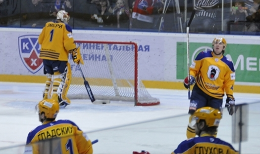 Lokototiv 5 - 1 Atlant